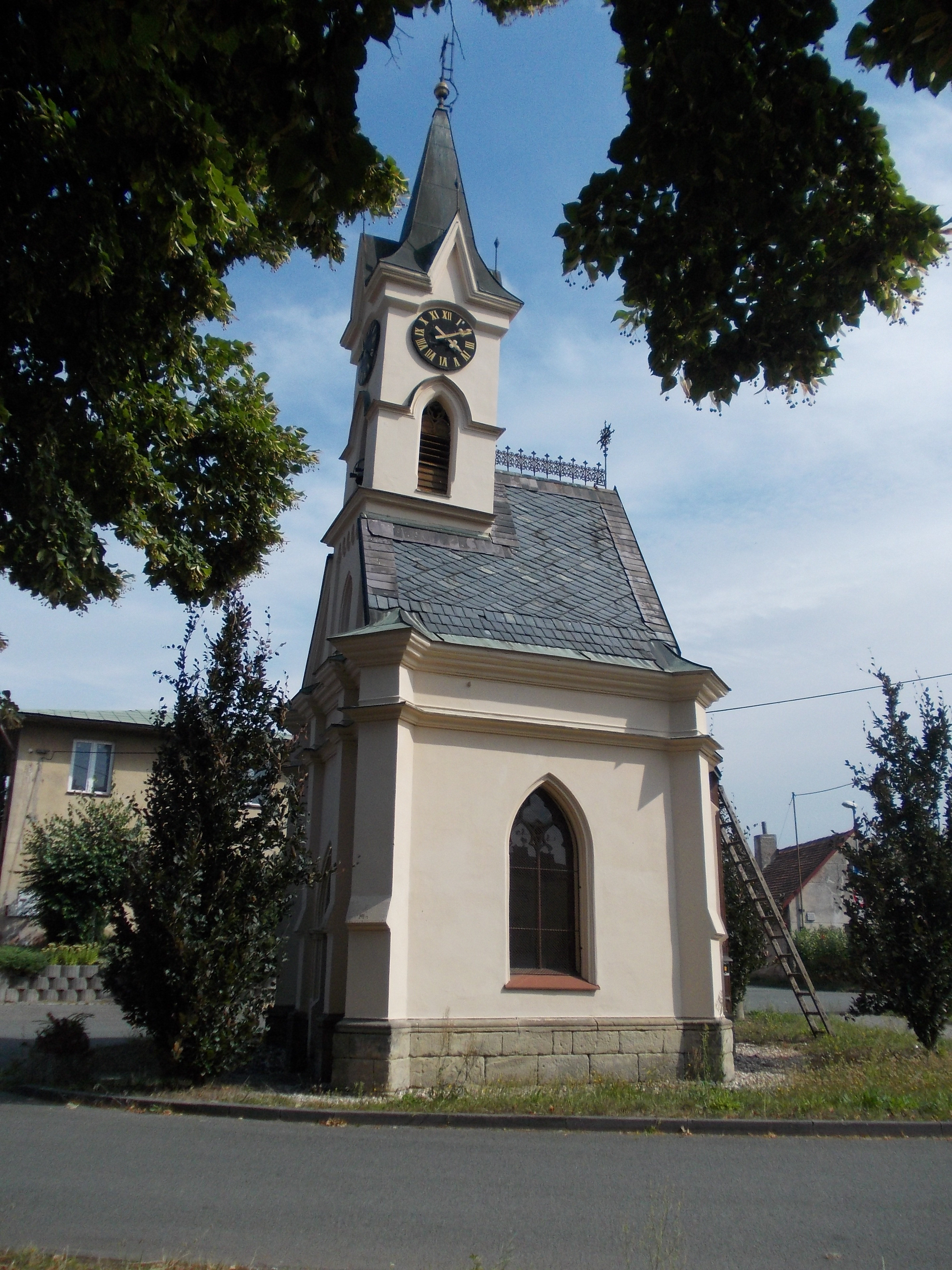 Dražkovice - Kaple andělů strážných